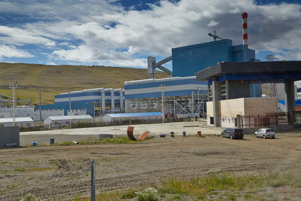 Río Turbio